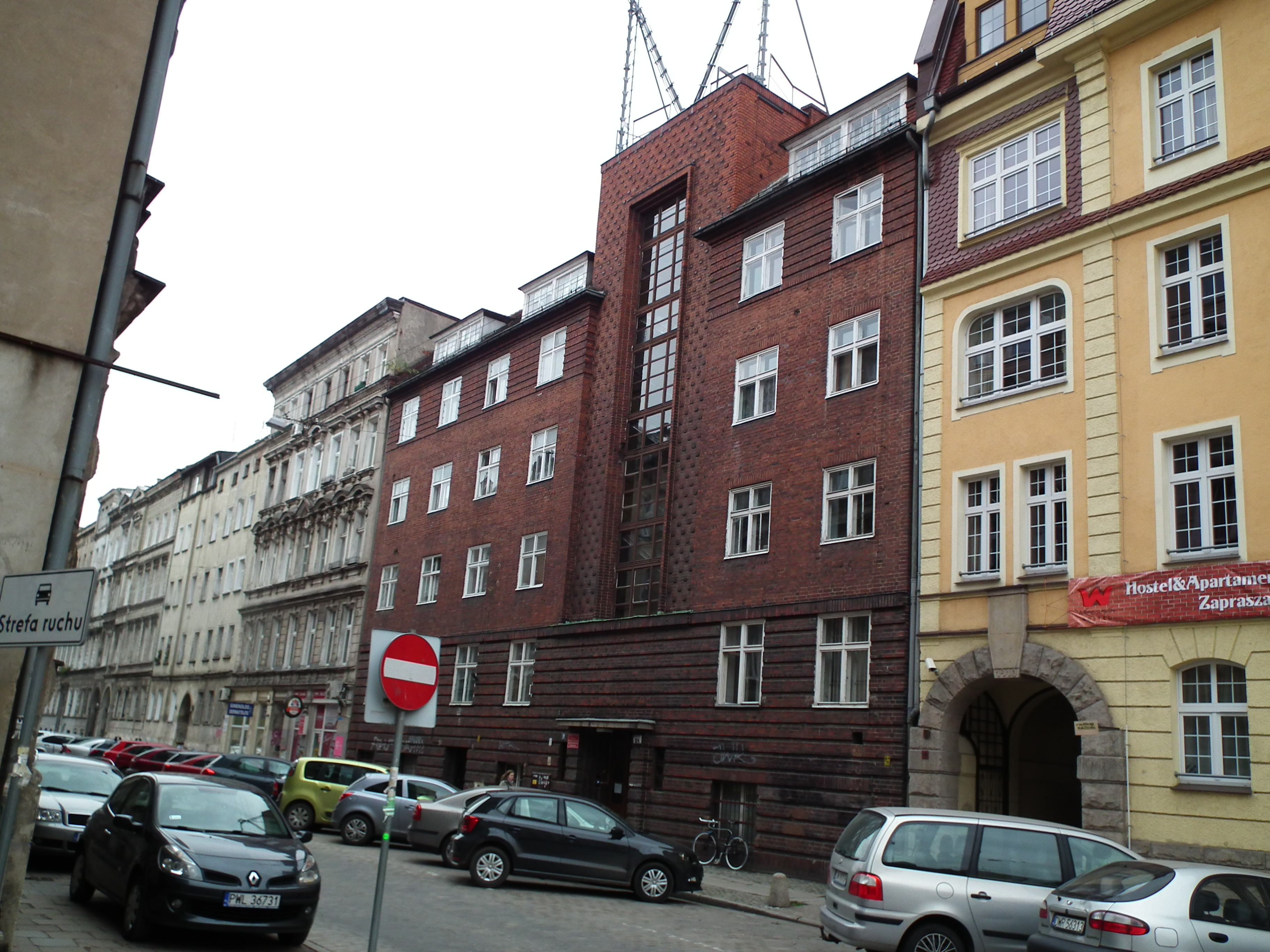 Dom Śląskiego Towarzystwa Dziewcząt Ewangelickich, Wrocław, ul. Komuny Paryskiej 21, obecnie Instytut Studiów Klasycznych, Śródziemnomorskich i Orientalnych UW. Architekt - Richard Gaze.